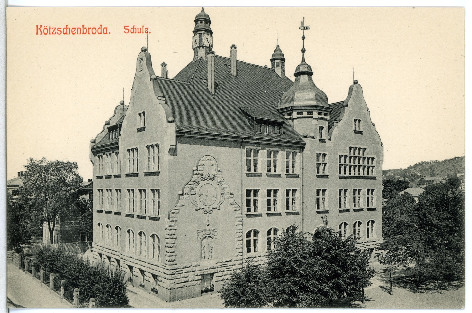 Radebeul; Schule This postcard is from publisher Brück & Sohn in Meißen ( postcard has a unique number 13797 and is available in a higher resolution at the publisher. This images was uploaded in a cooperation project between Wikipedians and the publisher.